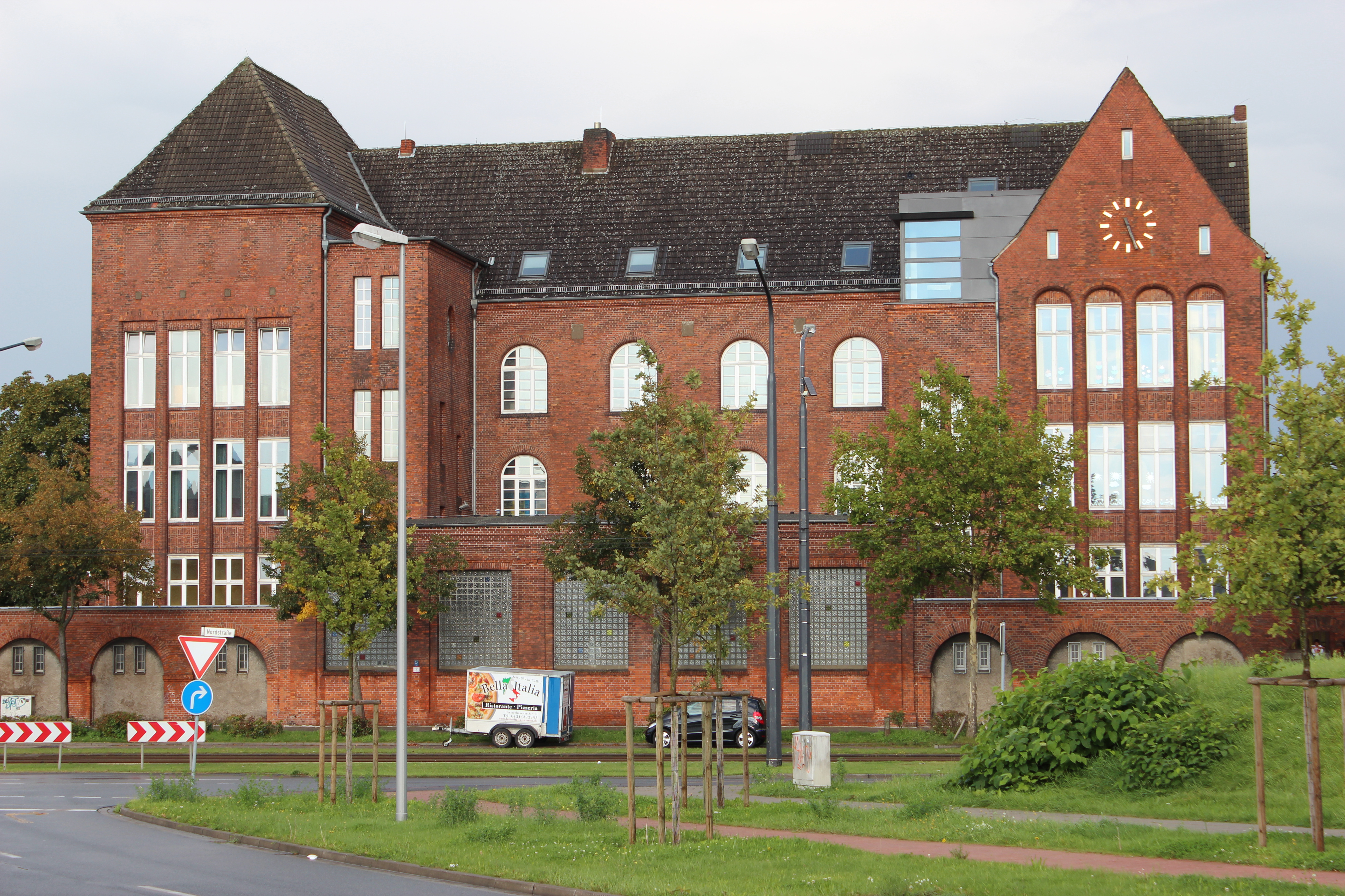 Volksschule am Holzhafen in Bremen, Nordstraße 349.Das abgebildete Objekt ist ein geschütztes Kulturdenkmal in der Freien Hansestadt Bremen, mit der Nr. 0938 beim Landesamt für Denkmalpflege registriert.